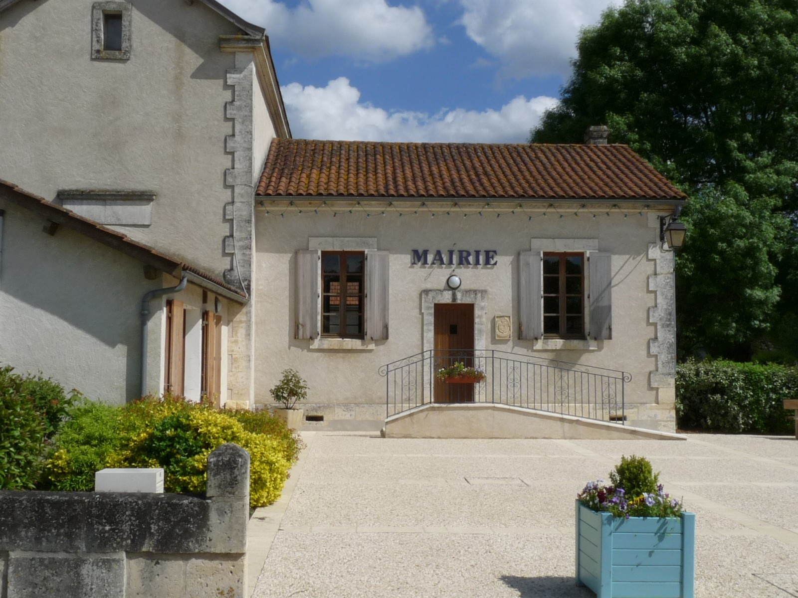 Mairie de Saint-Vincent-Jalmoutiers, Dordogne, France